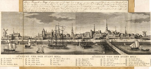 Scan from Johann Christoph Brotze's book Sammlung verschiedner Liefländischer Monumente. Aüssicht von der Stadt Riga. 1795 [J. Carmin; die Ansicht; die Gravüre].